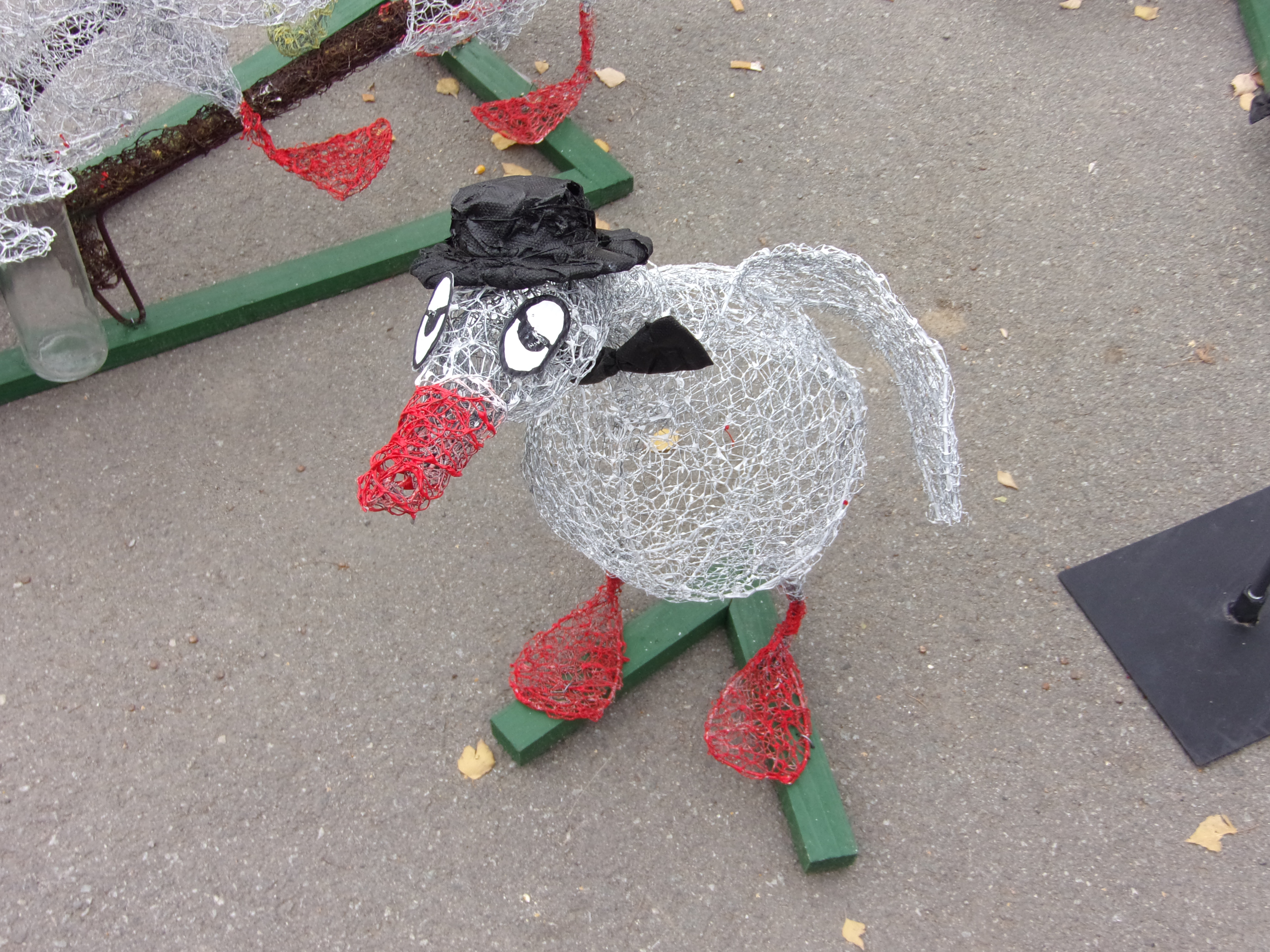 Ing. Takács Pál mérnök munkája